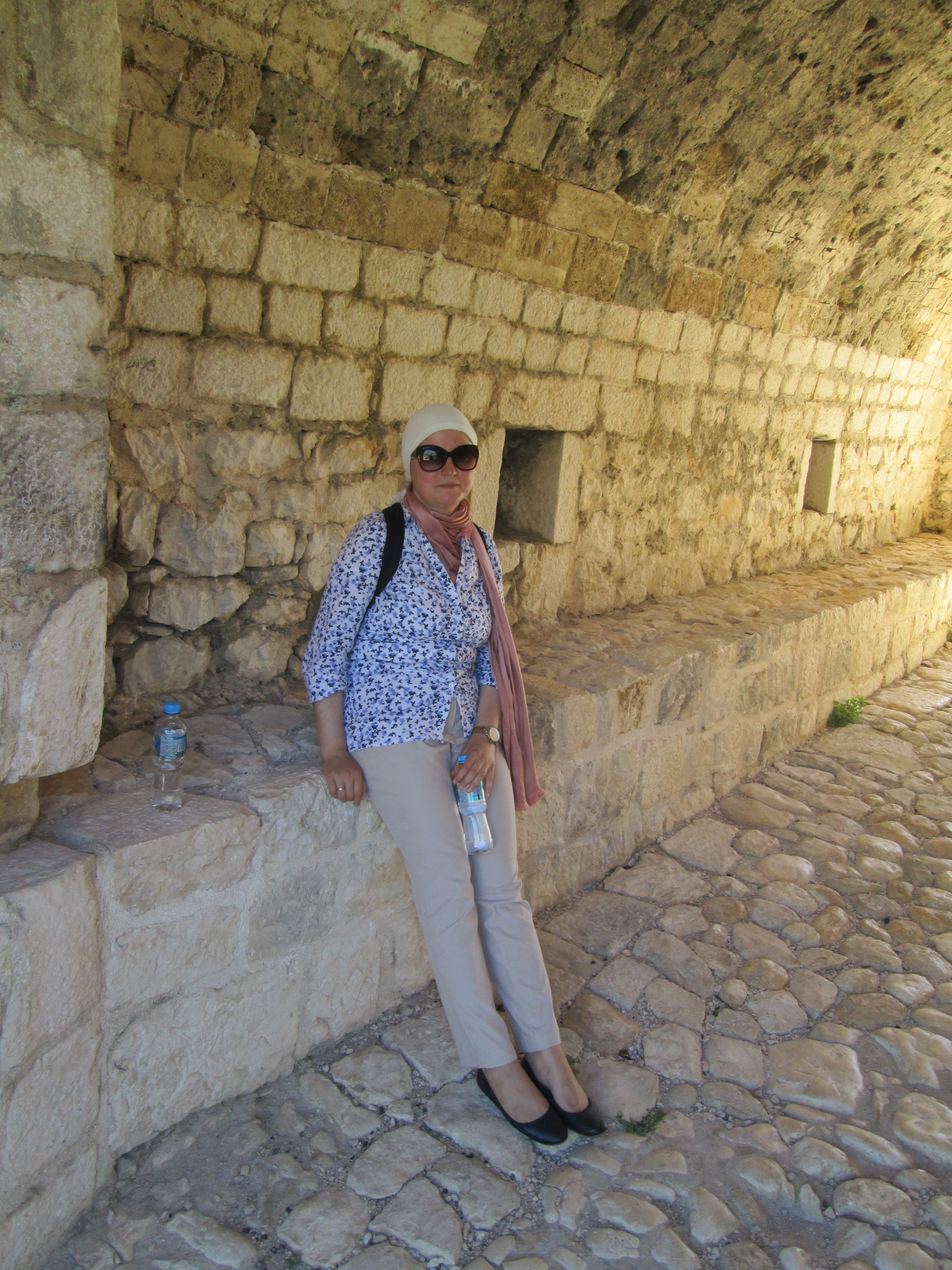 Srpskohrvatski / српскохрватски: Stolac 2016